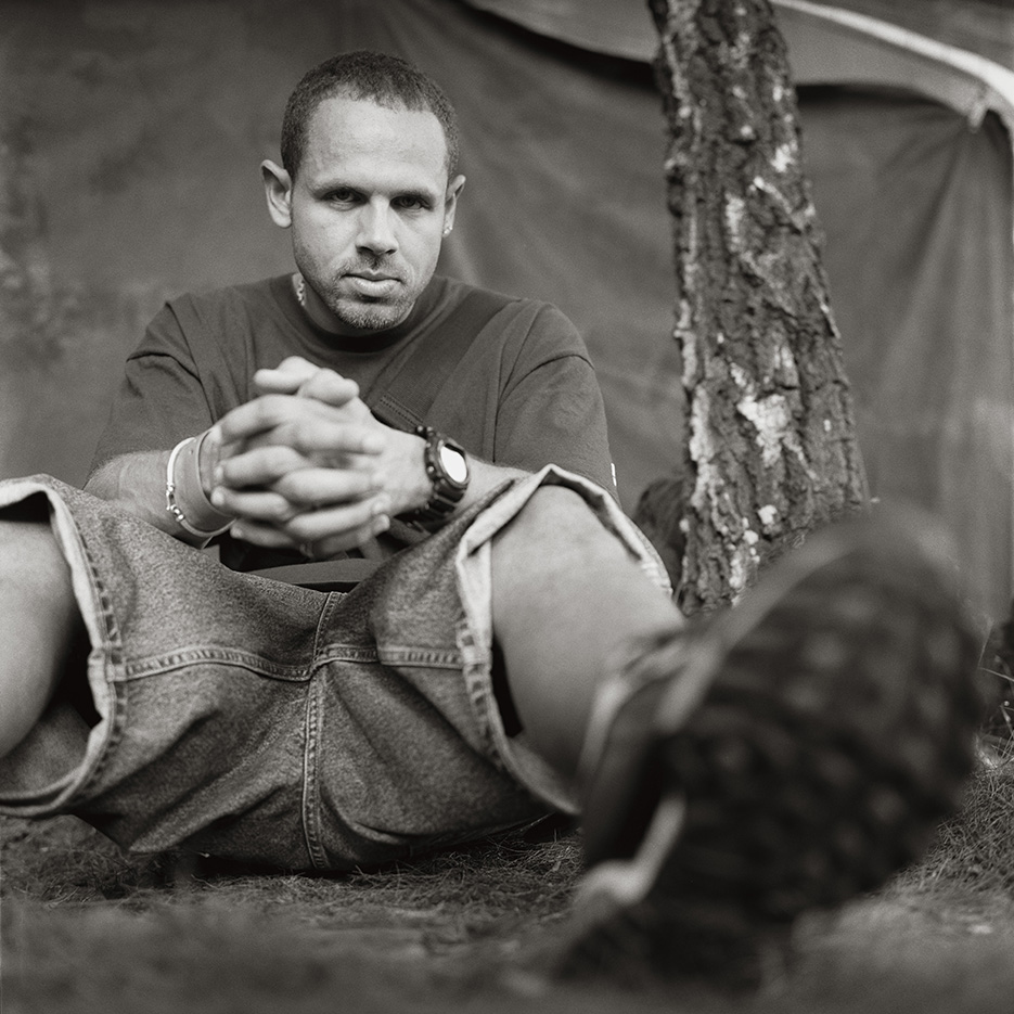 Dj Stylewarz